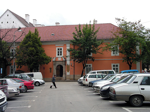 Cluj-Napoca, Convictus Nobilium (Casa Piariştilor), str.Universităţii nr.7